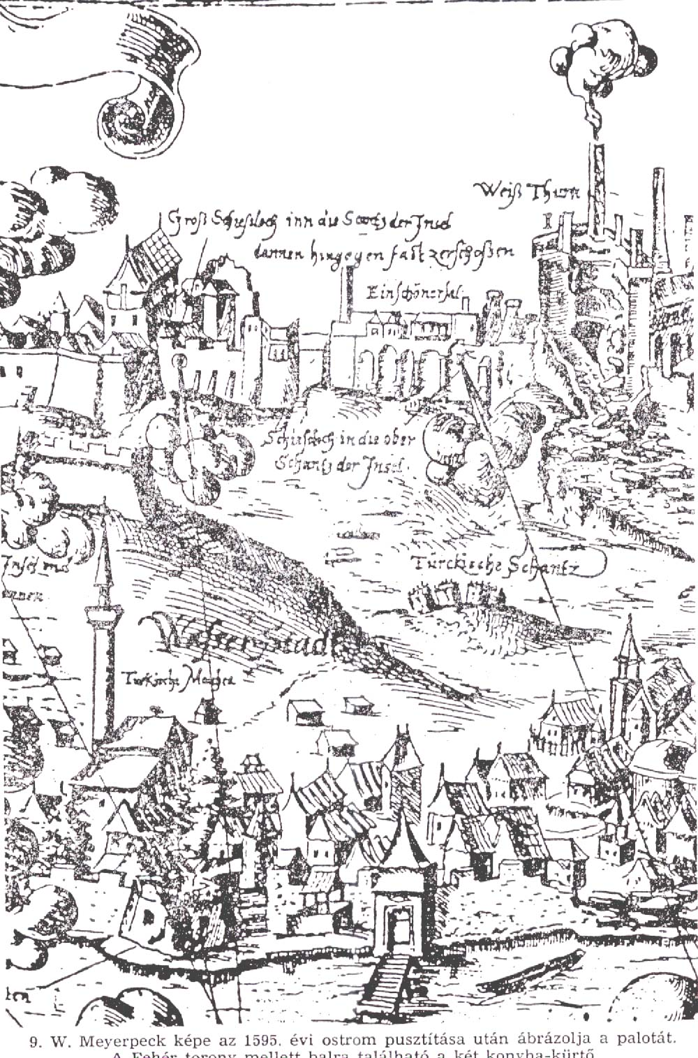 Meyerpeck metszete 1595-ből (publikálta Lepold Antal, Esztergom régi látképei, 1939). Meyerpeck metszete alapján a Fehér-torony (Weiss-thurm) ötszögalaprajzú és háromszintű hatalmas lakótömb volt, melynek az 1595-ös ostromban a tetőszerkezetét szétlőtték